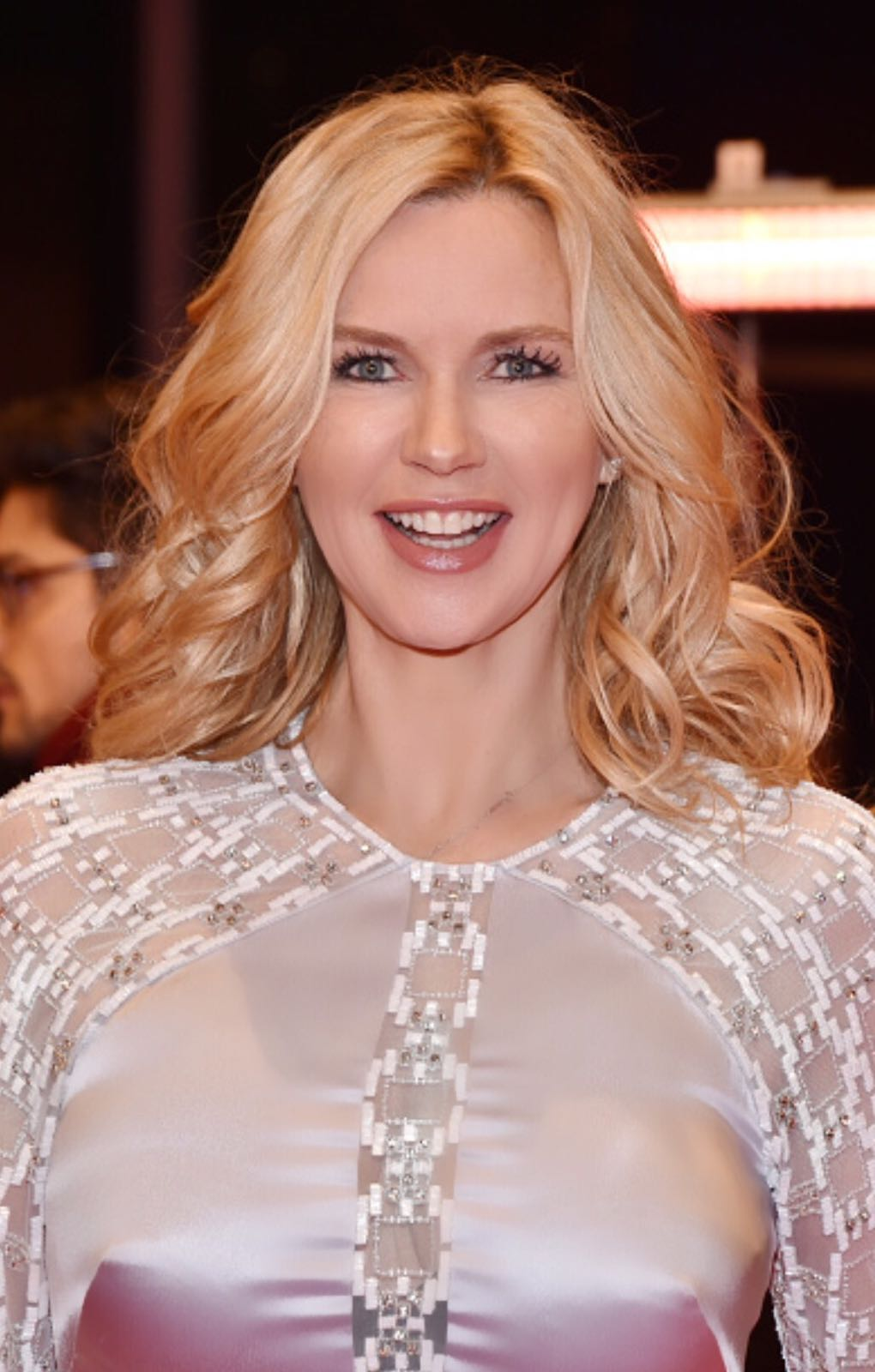 Veronica Ferres auf der Berlinale 2017 in Berlin